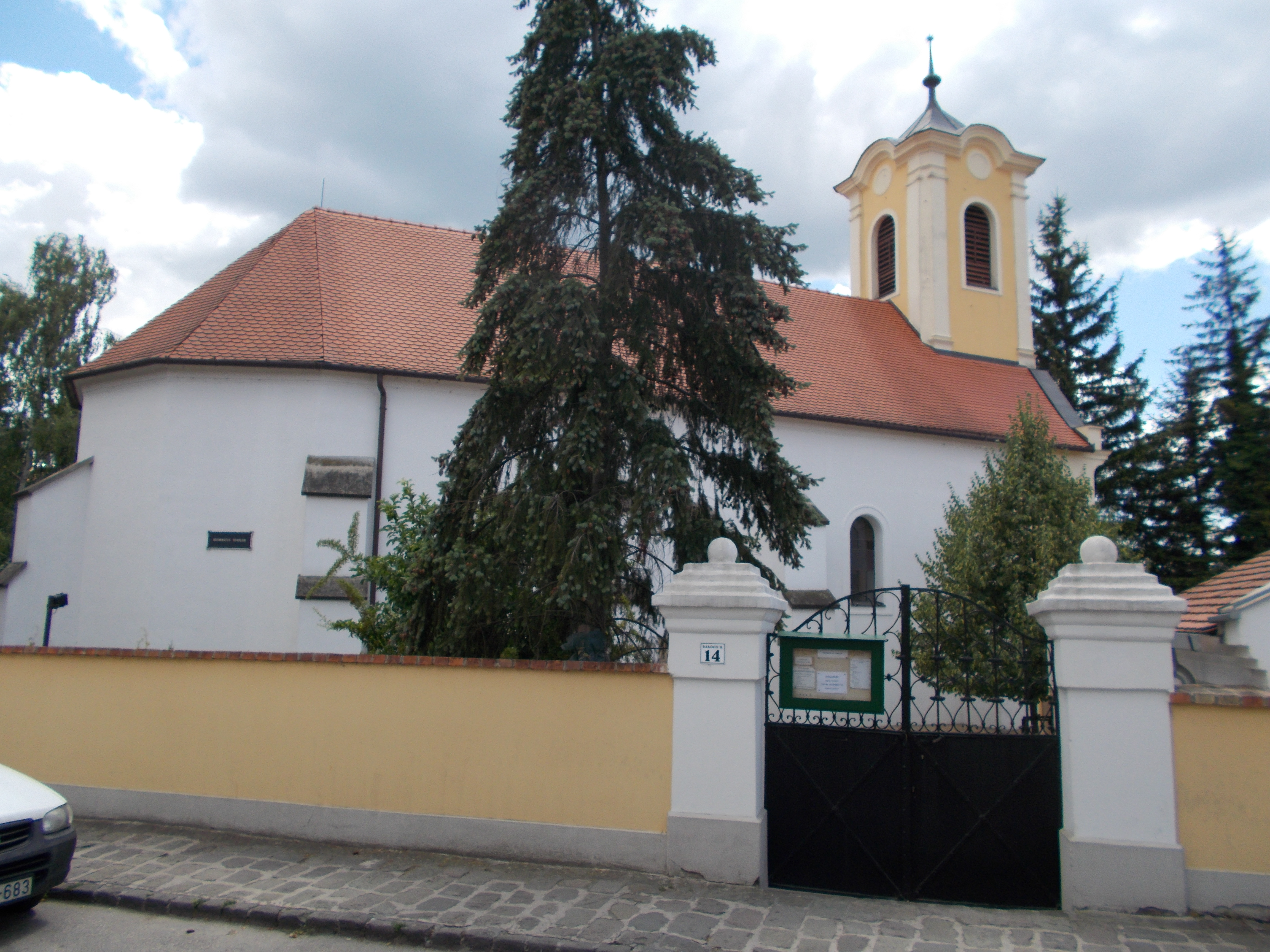 Volt Opovacska-templom. Műemlék ID 7394. Kapu. Most Református, egyhajós, középtornyos templom - Szentendre, Rákóczi Ferenc utca 14 This is a photo of a monument in Hungary, Identifier: 7394